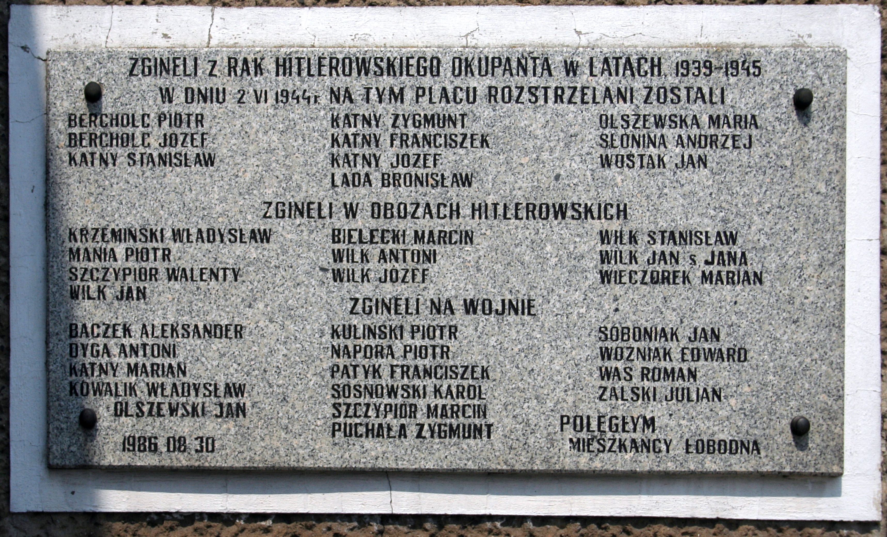 Tablica poświęcona zabitym w czasie II wojny światowej na ścianie remizy strażackiej w Łobodnie, woj. śląskie